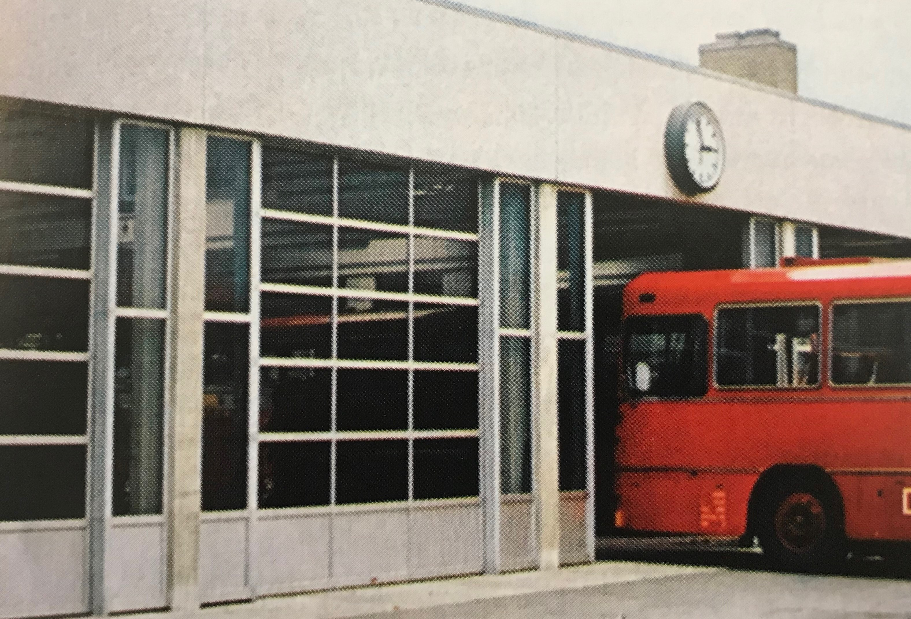 Svendborg rutebilstation